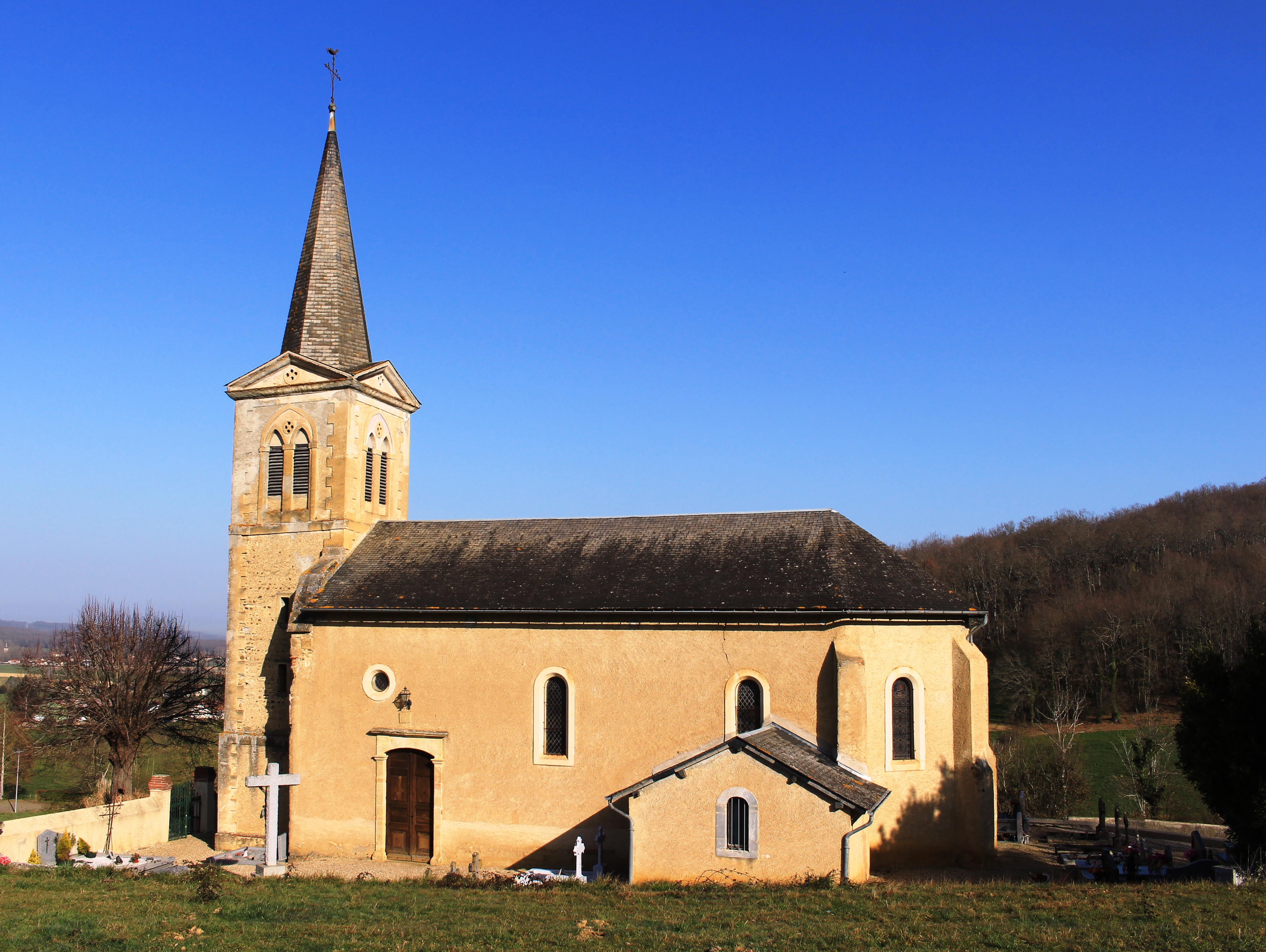 Église Saint-Laurent de Trouley-Labarthe (Hautes-Pyrénées)